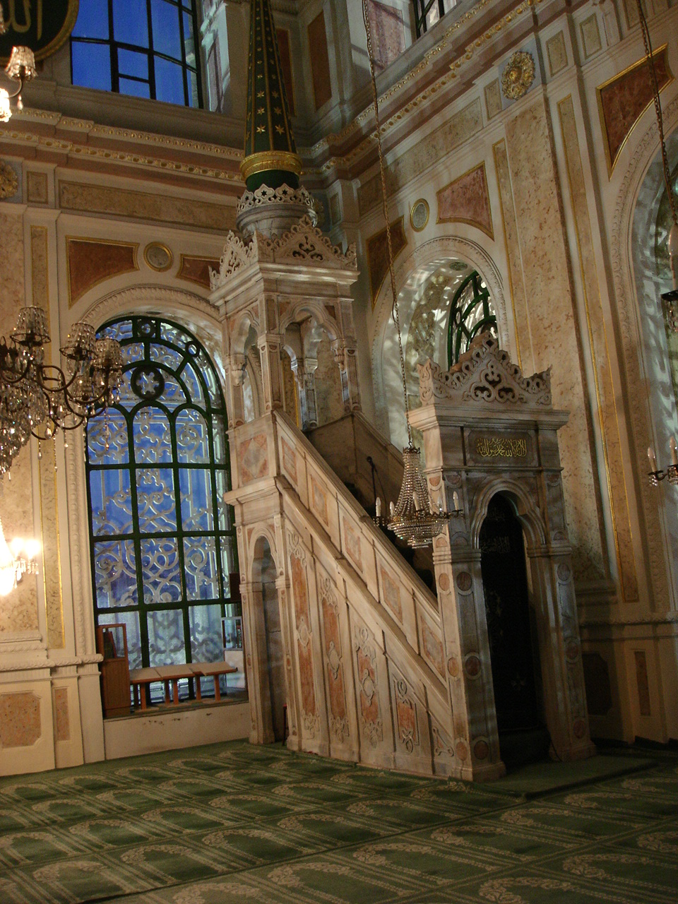 Minbar della moschea di Ortaköy, a poca distanza da Istanbul, capolavoro dello stile soprannominato "barocco" dell'architettura ottomana. Foto di: Giovanni Dall'Orto, 30-5-2006.